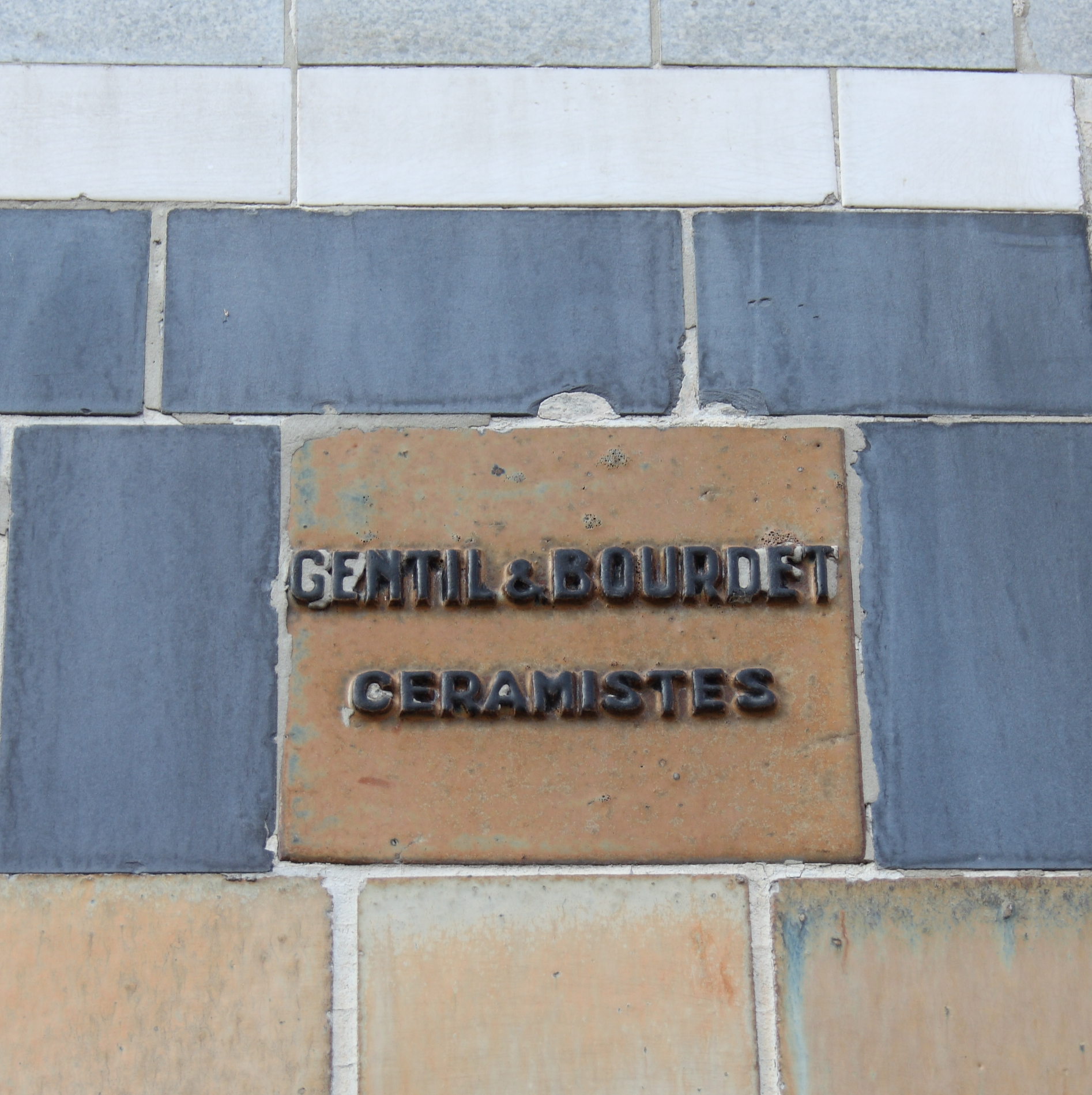 Wohnhaus 21, rue des Perchamps in Paris (16. Arrondissement), Architekt: Henri Sauvage